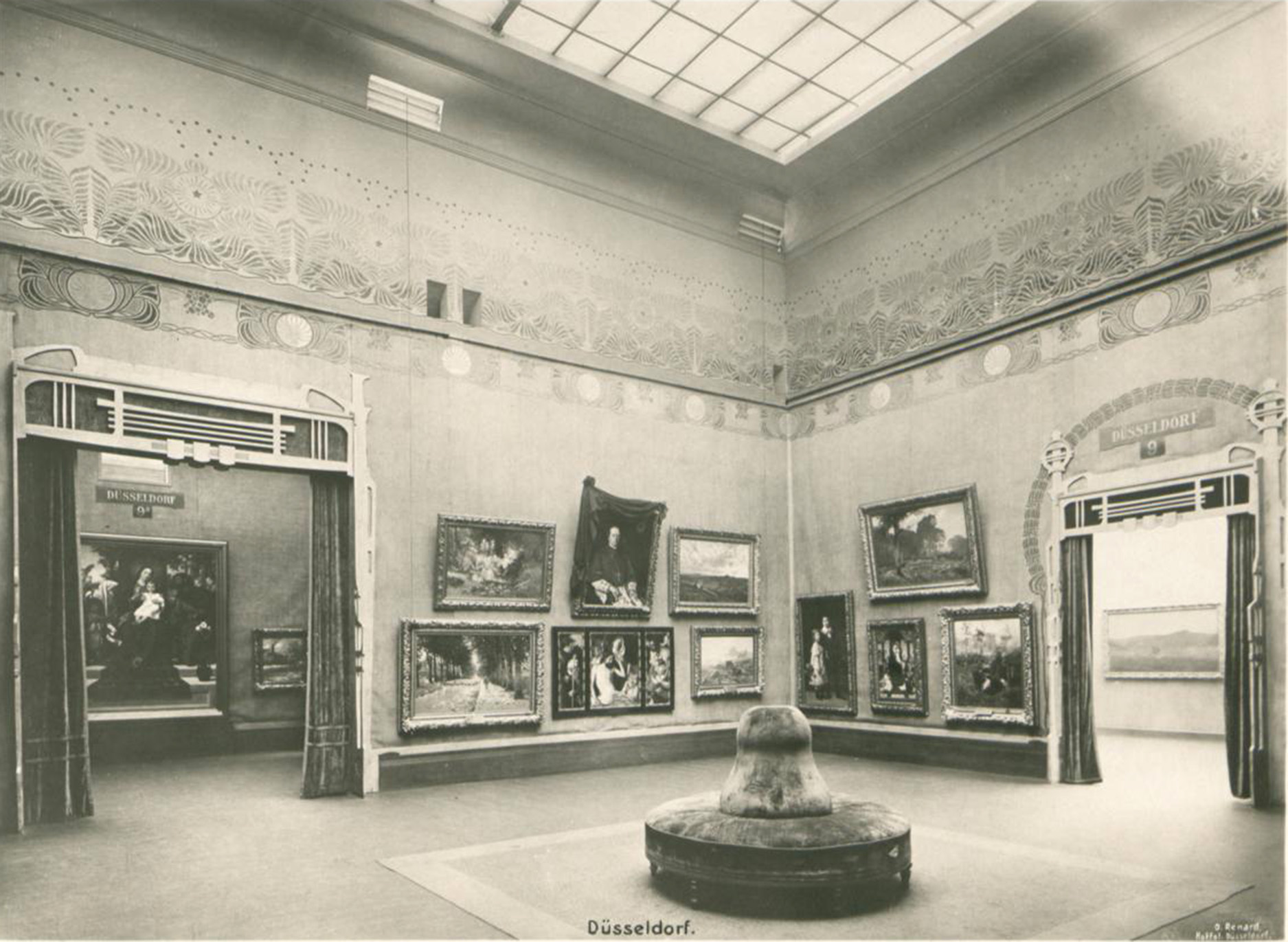 Kunstpalast, Raum 9 Düsseldorf, Foto Otto Renard, 1902